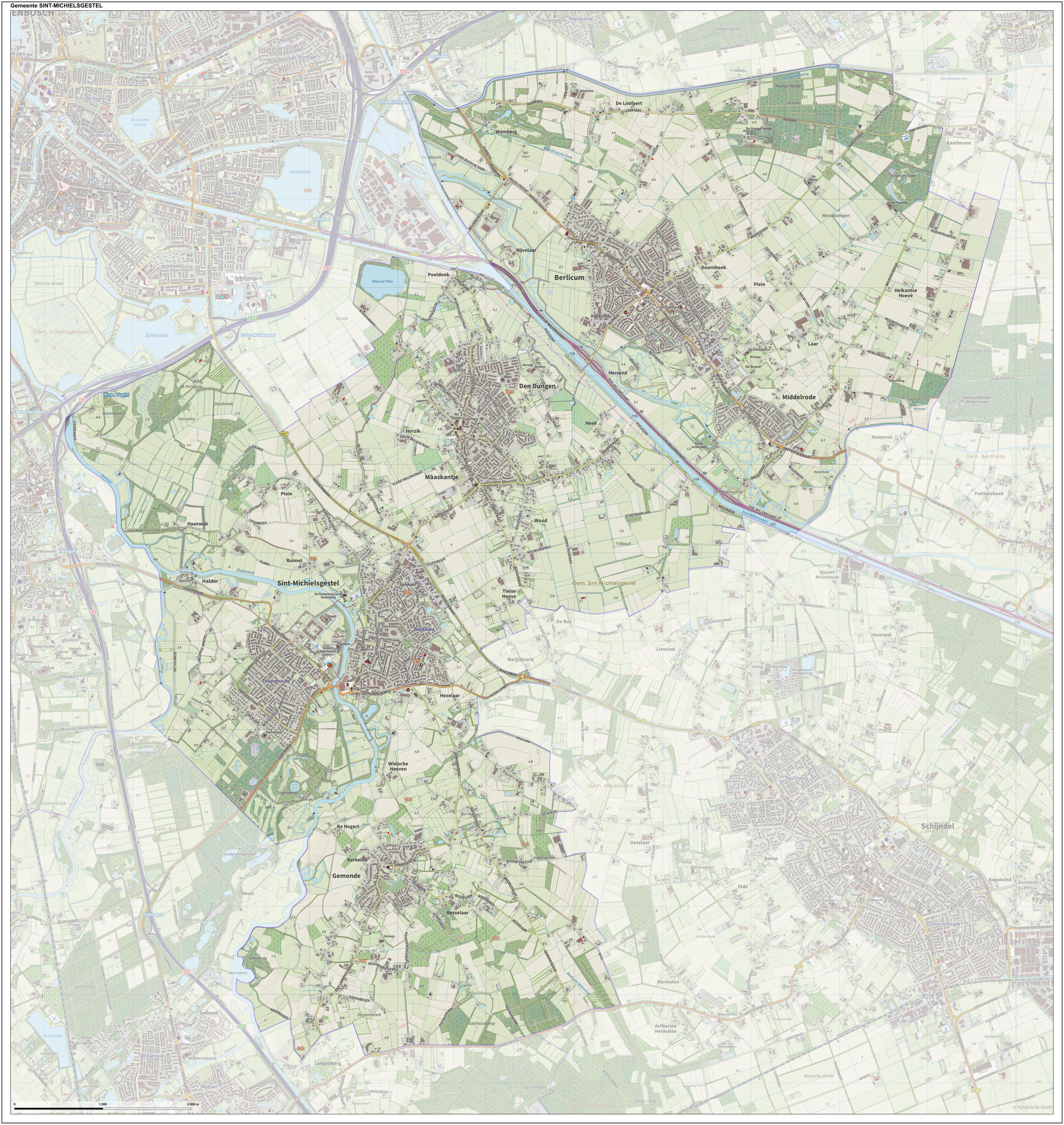 Topografische gemeentekaart. Resolutie: 400 pixels/km. Kaartbeeld samengesteld uit de open geodata van de Top10NL en Top25namen (Kadaster), Creative Commons-BY licentie. Gebouwvlakken uit open geodata BAG extract. Wegen uit de OpenStreetMap, OpenStreetMap community. Reliëfschaduw uit de Actuele Hoogtekaart AHN2. Samenstelling en kleurenschema: Jan-Willem van Aalst, met QGIS. Zie ook de Legenda.